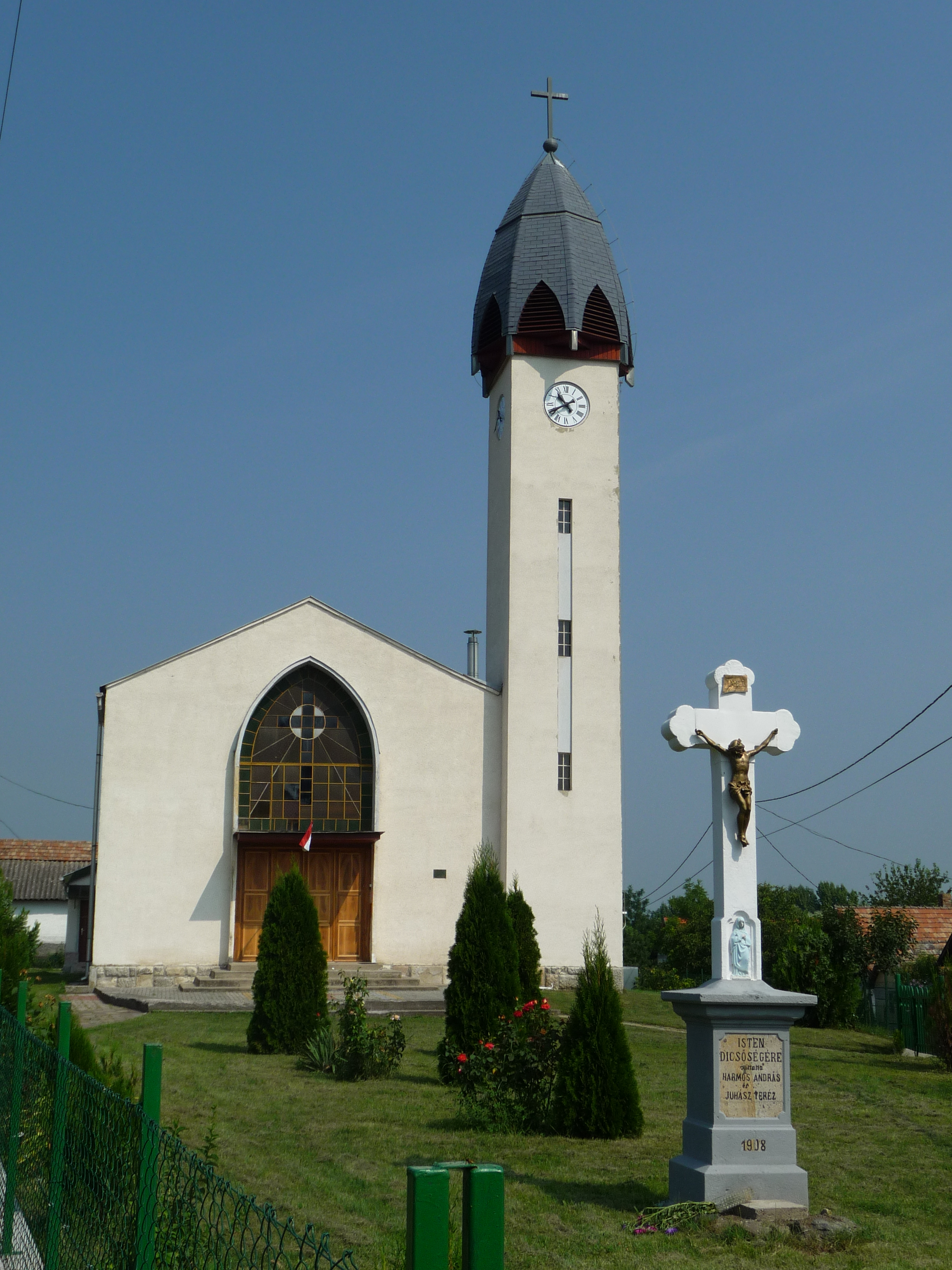 Római katolikus templom Kisbágyonban